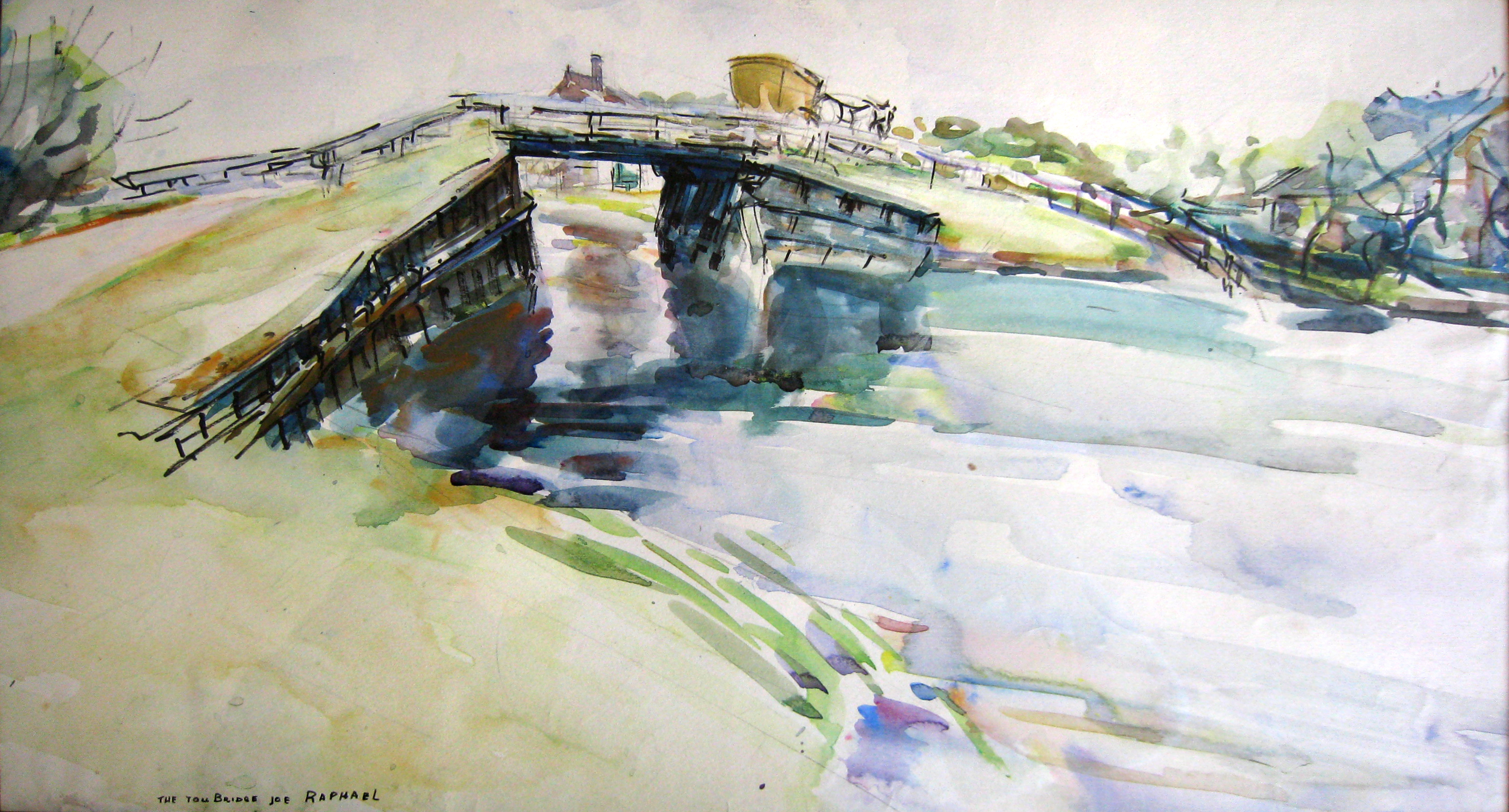 Waterverfschilderij gemaakt door Joe Raphaël 1935: Tou Bridge